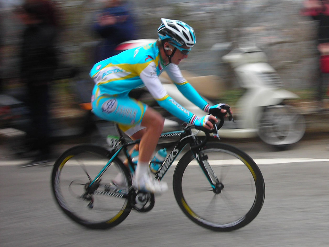 Enrico Gasparotto sulle Manie alla Milano-Sanremo 2012